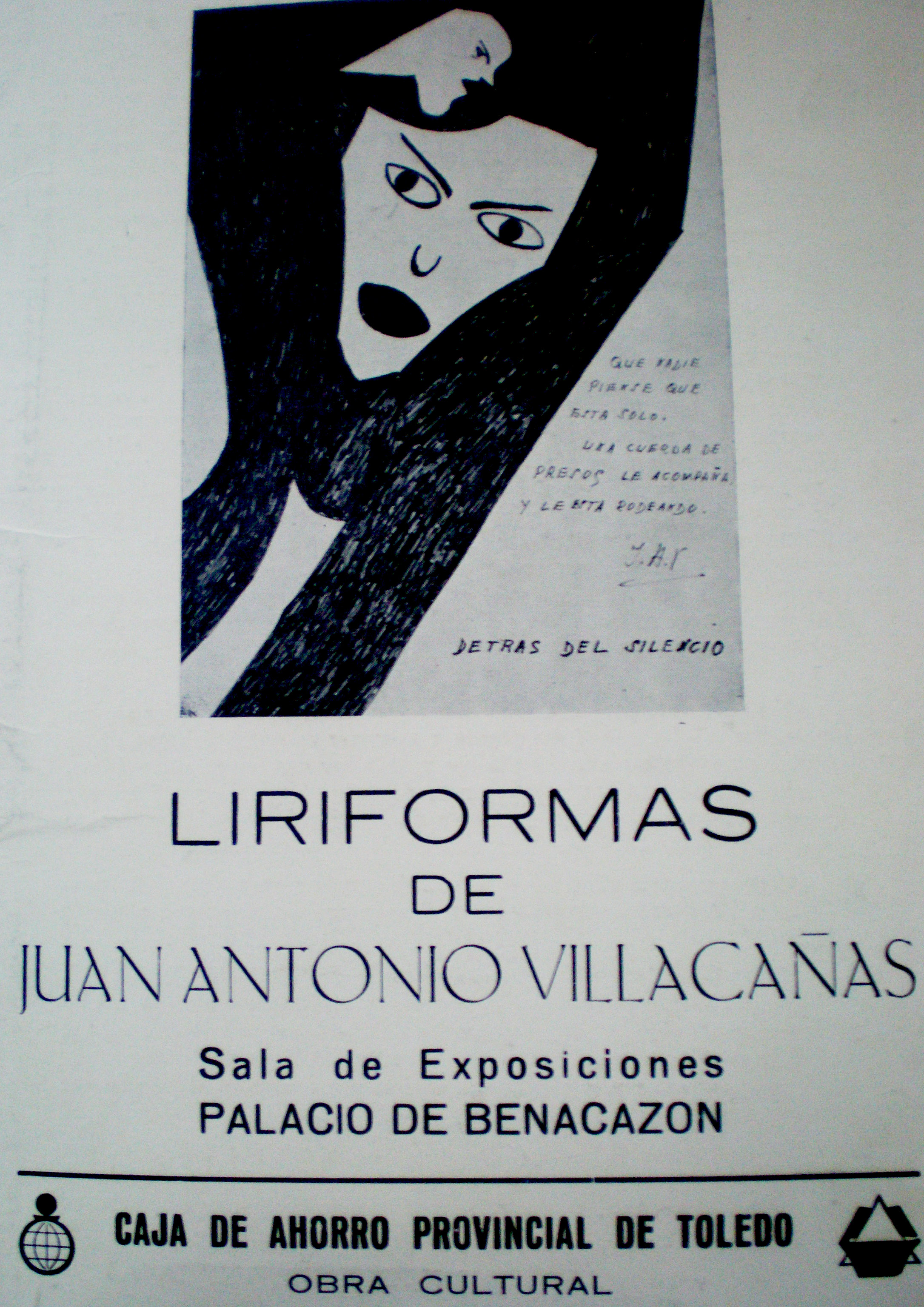 Invitación a presentación de liriformas